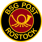 Logo BSG Post Rostock